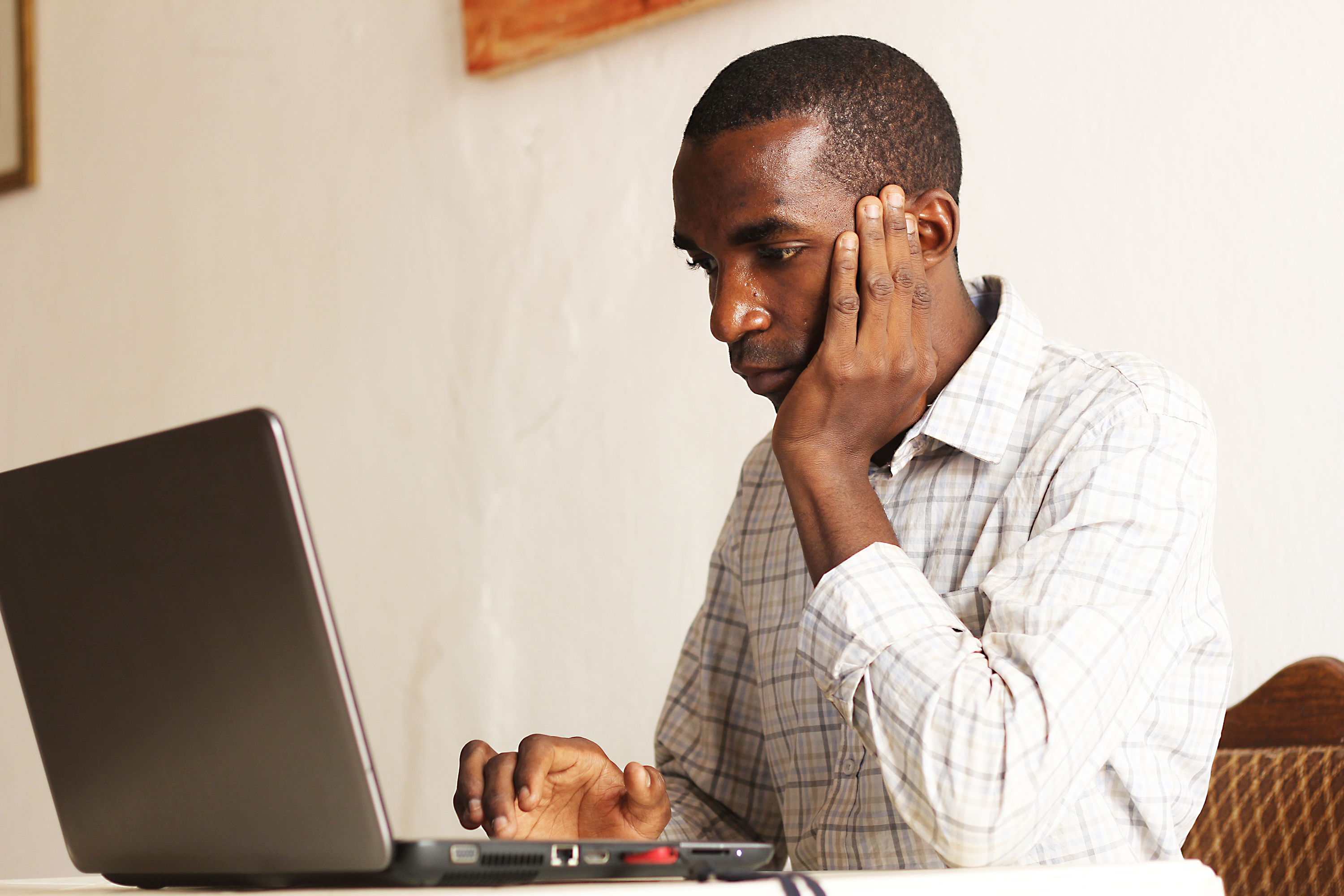 Un homme regardant l'ordinateur très concentrer